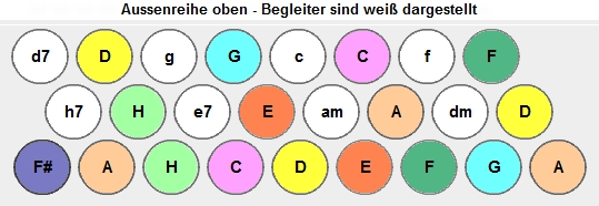 Tastenbelegung Bass Harmoschka